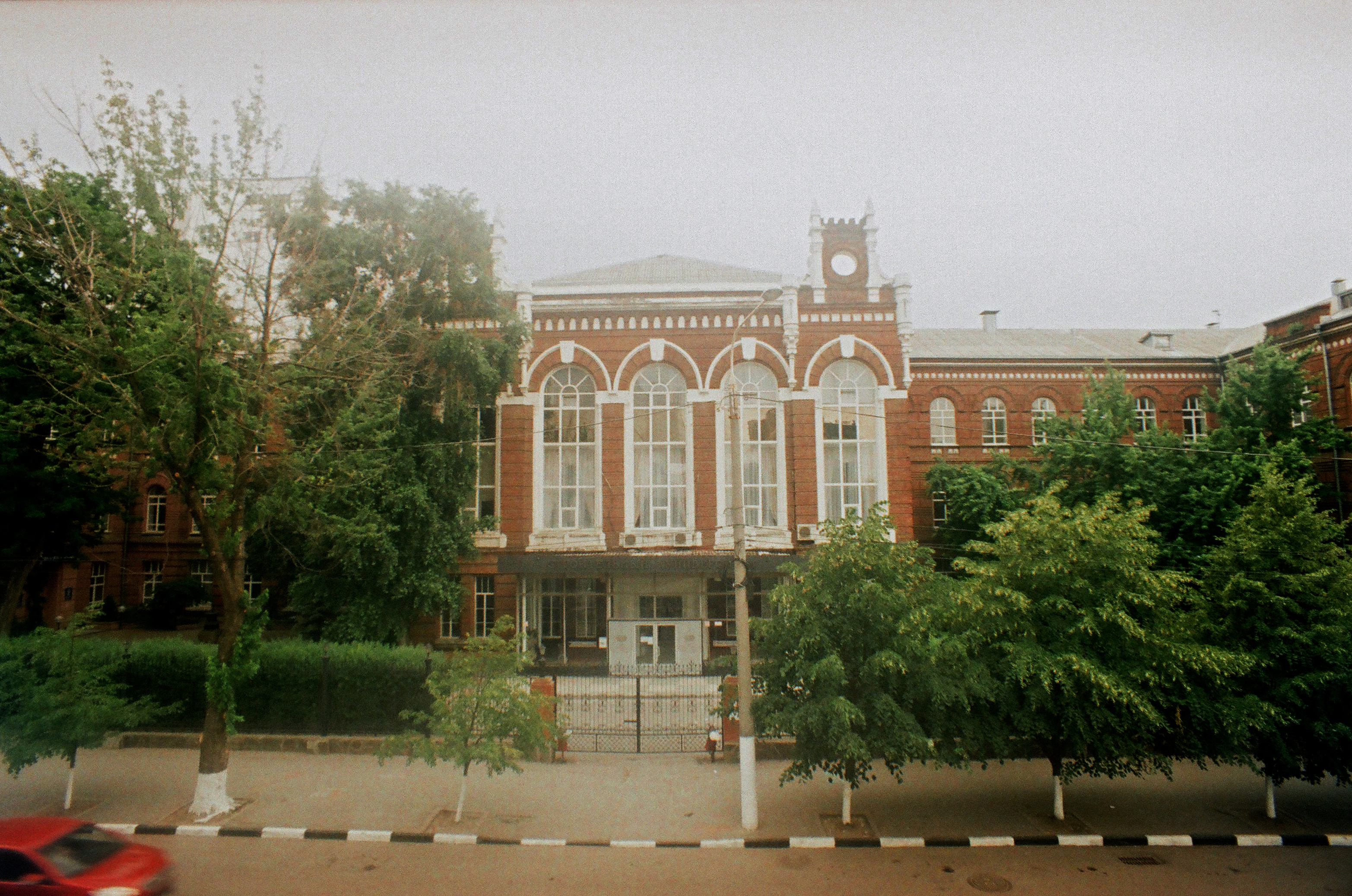 Здание городского коммерческого училища (Ростовская область, Ростов-на-Дону, Социалистическая улица, 162)